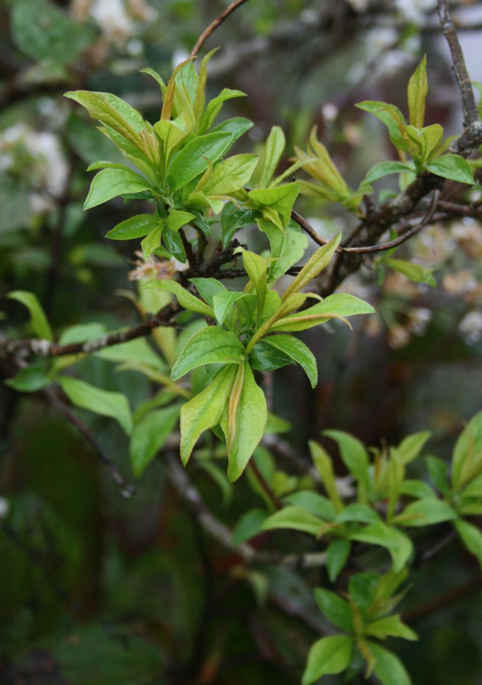 Prunus salicina, Rosengewächse (Rosaceae) - Vietnam/Việt Nam: Dorf Tả Phìn nördlich von Sa Pa (Prov. Lào Cai)